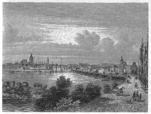 Frankfurt an der Oder, Frankfurt/a.d. Oder, c. 1830